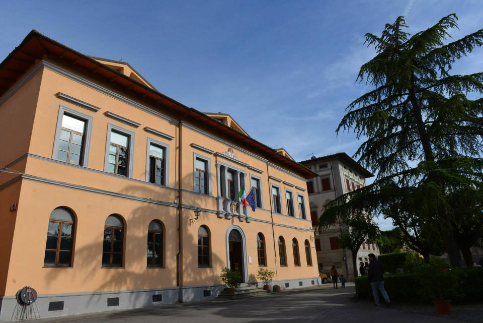 Casa della Cultura a Chiusi - sede della Biblioteca comunale, dell'Informagiovani e dell'Archivio storico comunale